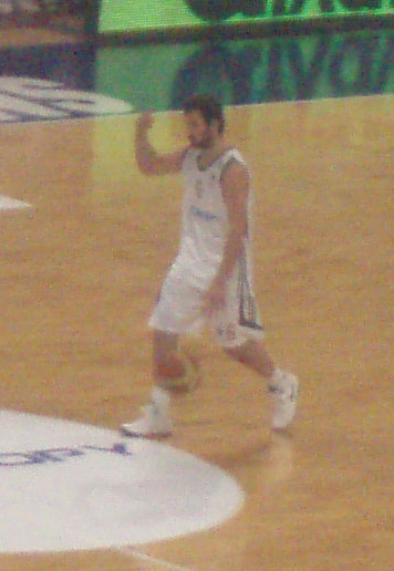 vasilis Spanoulis